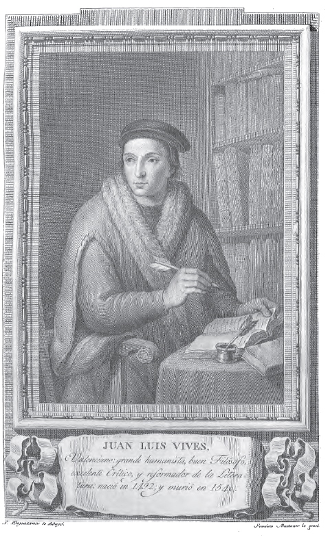 Retrato de Juan Luis Vives.